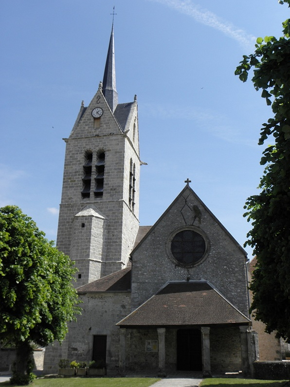 Église Sainte-Marie-Madeleine de Pécy (77).